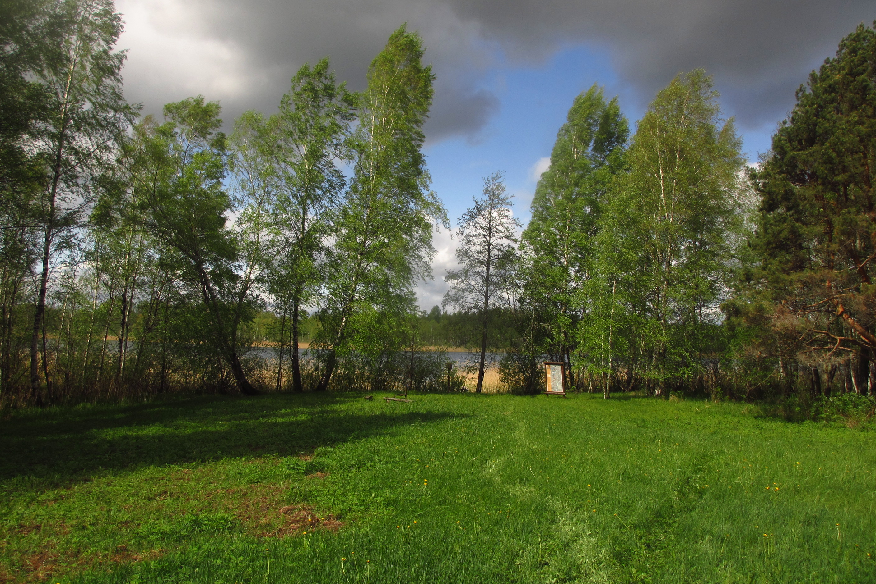 Keeri-Karijärve LKA Karijärve äärses puhkekohas